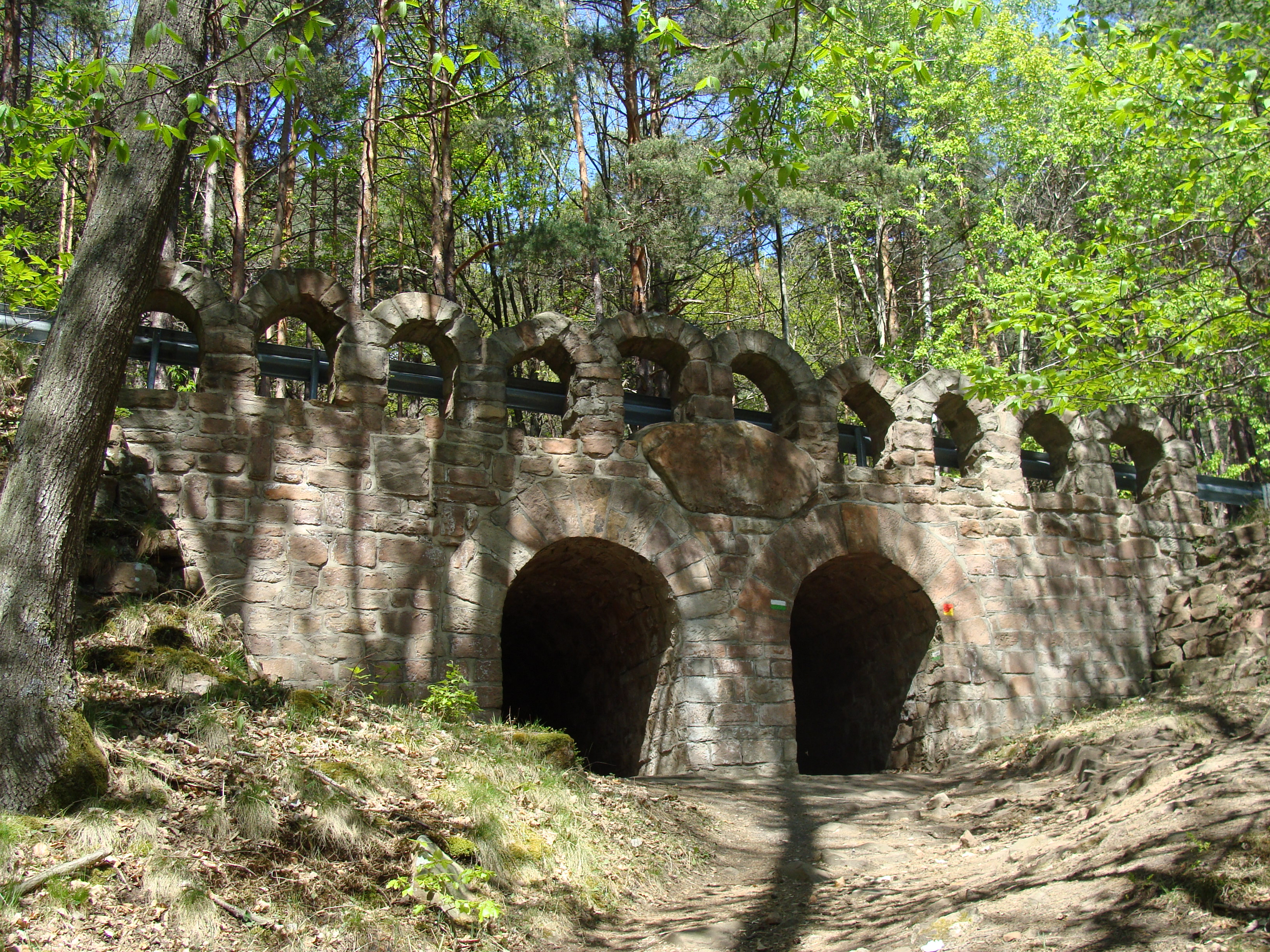 Kalmithöhenstrasse (Brückenbauwerk bei Höhenmeter 400 üNN)